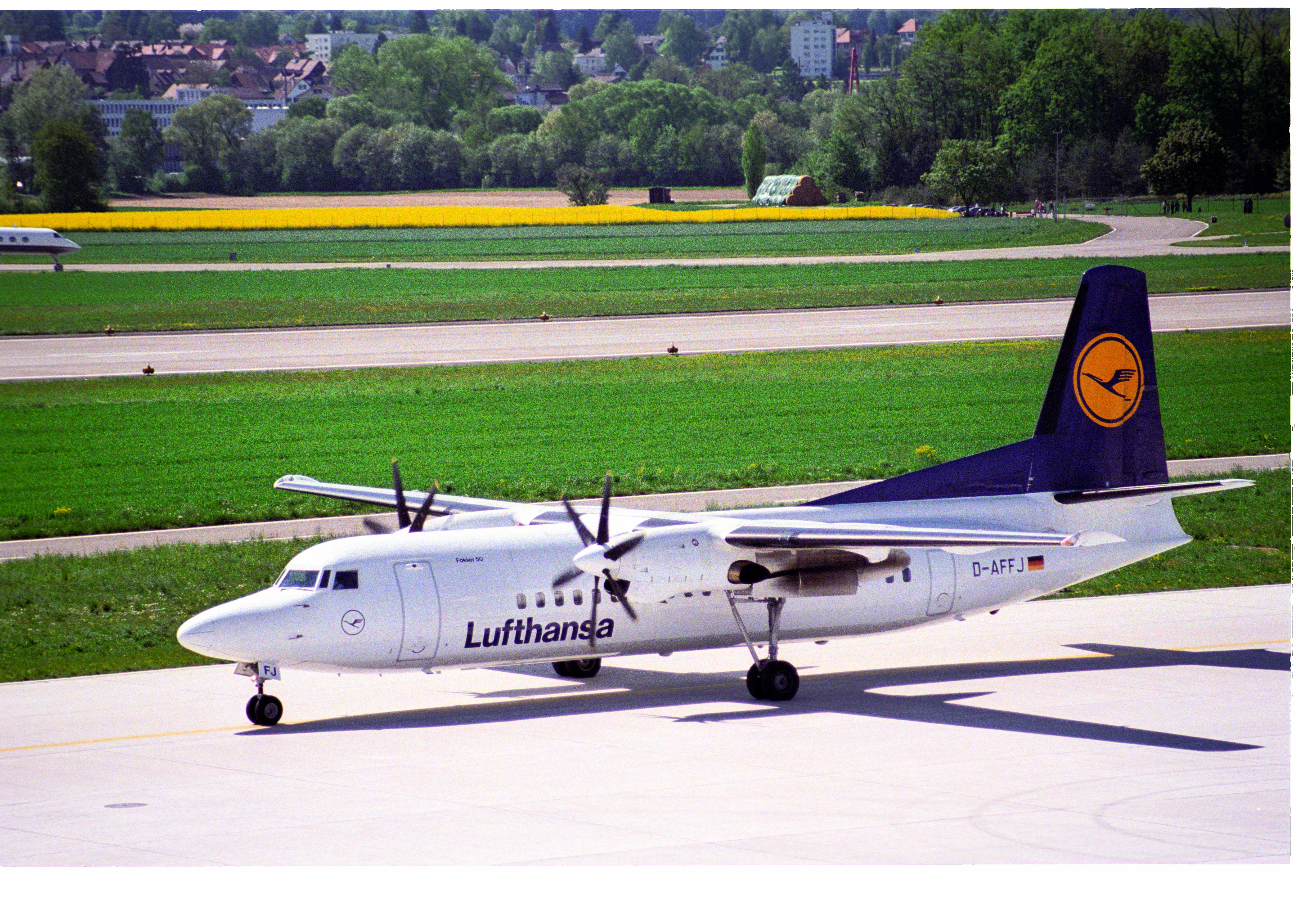 Lufthansa Cityline Fokker 50; D-AFFJ@ZRH;06.05.1995